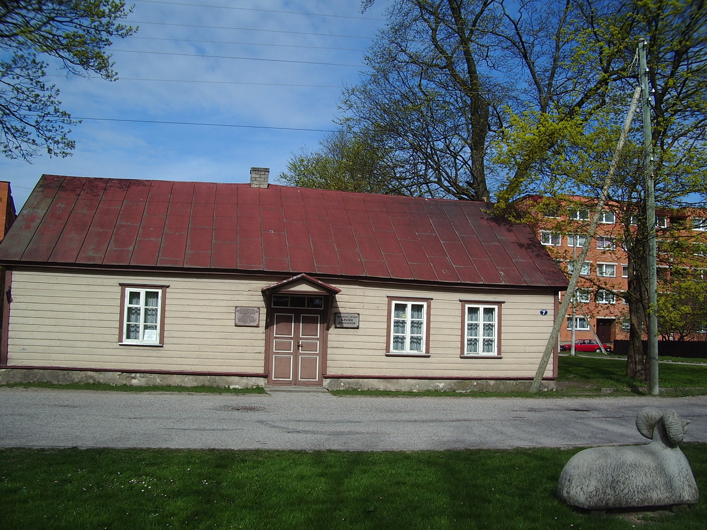 Aavikute majamuuseum, Vallimaa 7, Kuressaare